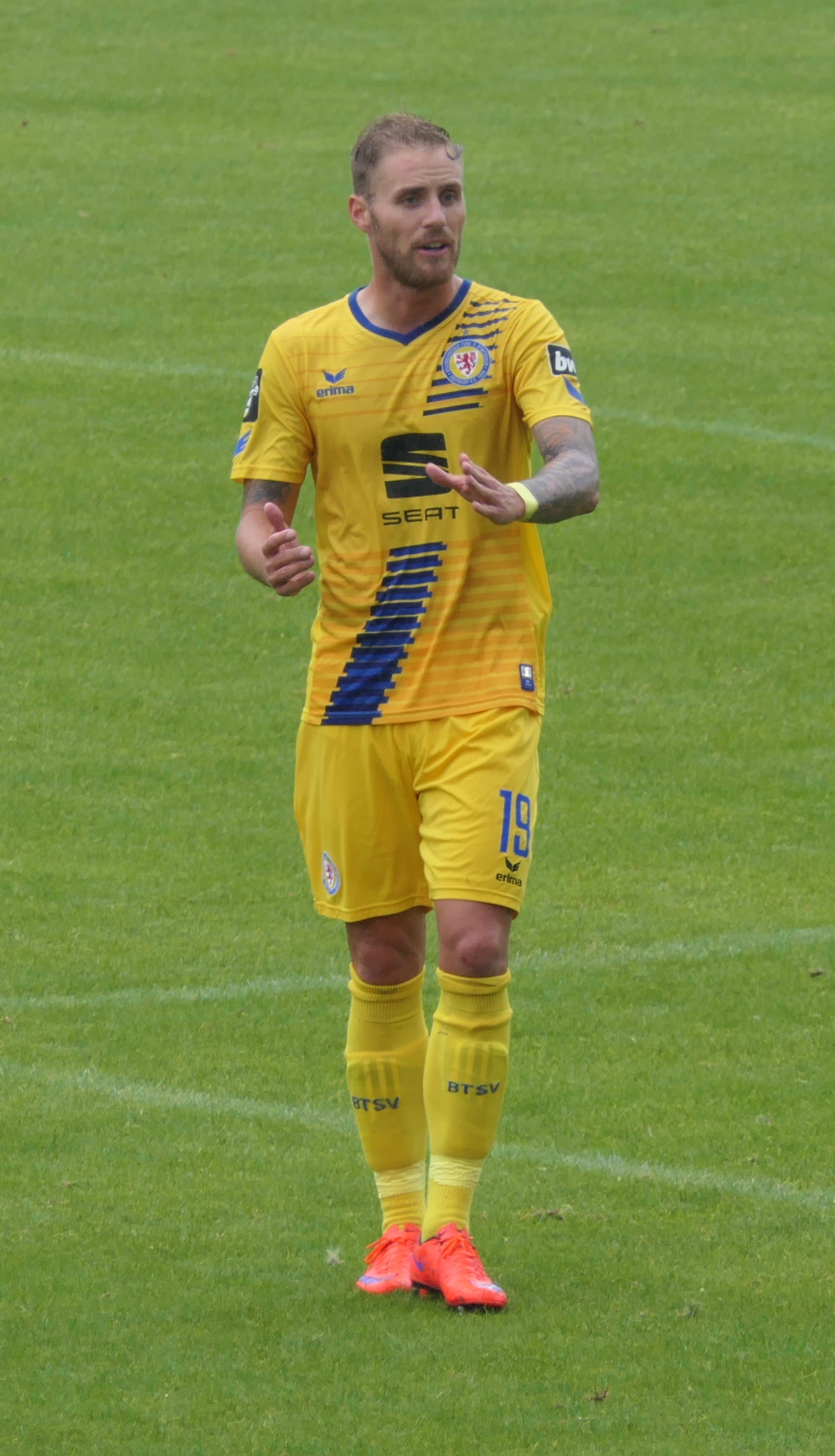 Der Fussballprofi Felix Burmeister im Trikot von Eintracht Braunschweig beim Auswärtsspiel bei der SpVgg Unterhaching am 01.09.2018.